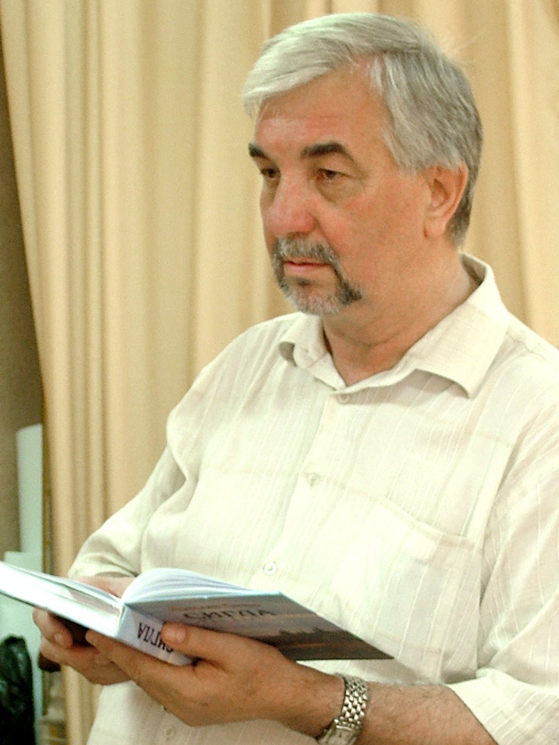 Український актор, режисер Іван Ляховський читає вірші Ярослава Сачка під час презентації посмертної збірки поета «Сигла» в Тернопільському обласному краєзнавчому музеї 16 серпня 2008 року.